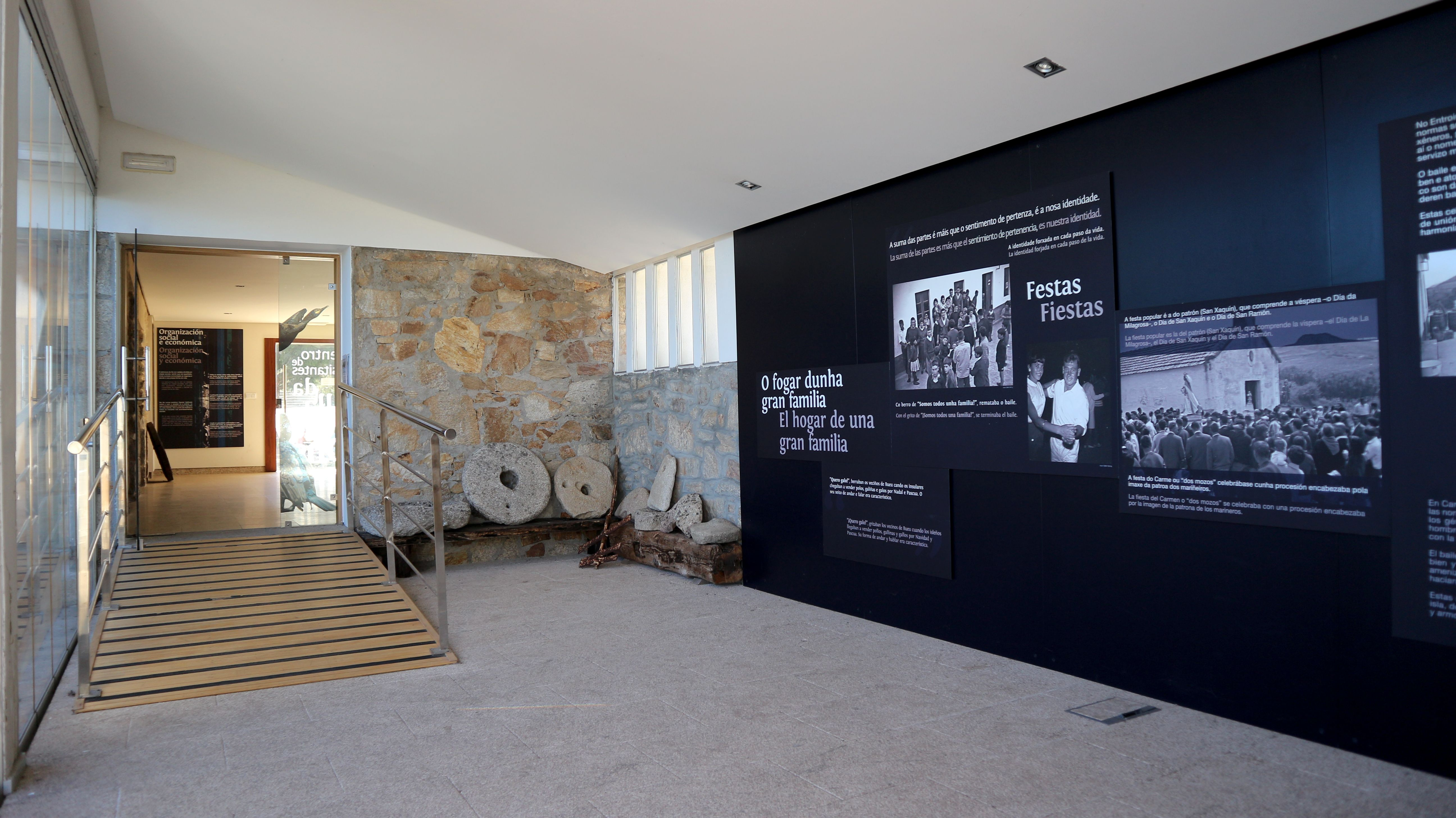 Centro de visitantes da Illa de Ons, no Curro. A Illa de Ons, Ons, Bueu - Parque Nacional das Illas Atlánticas de Galicia.